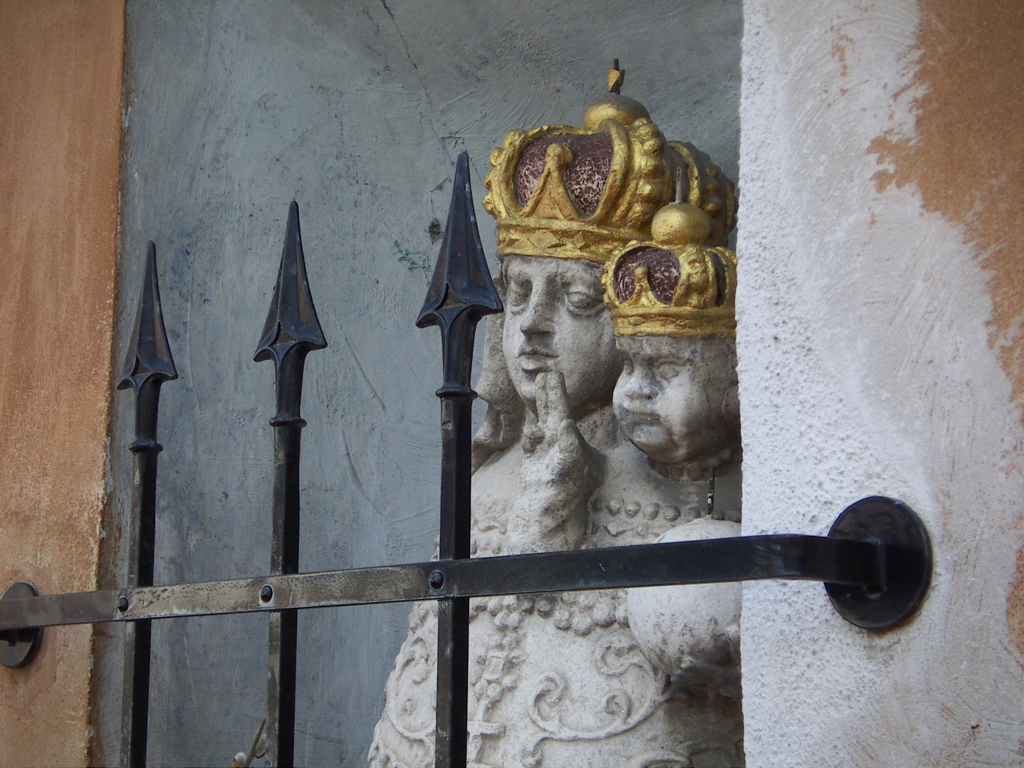 Jedlesee MadonnaMitKind AntonBoschGasse12